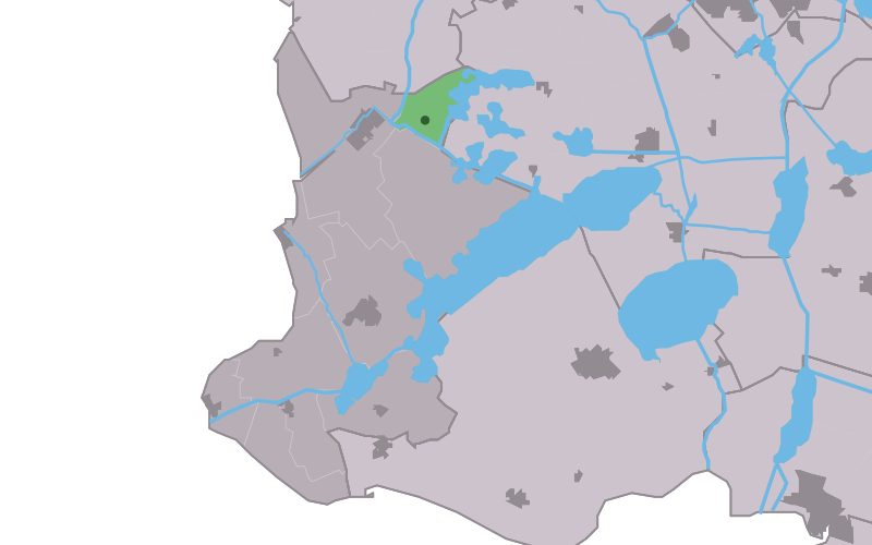 Kaartsje fan himrik fan Nijhuzum